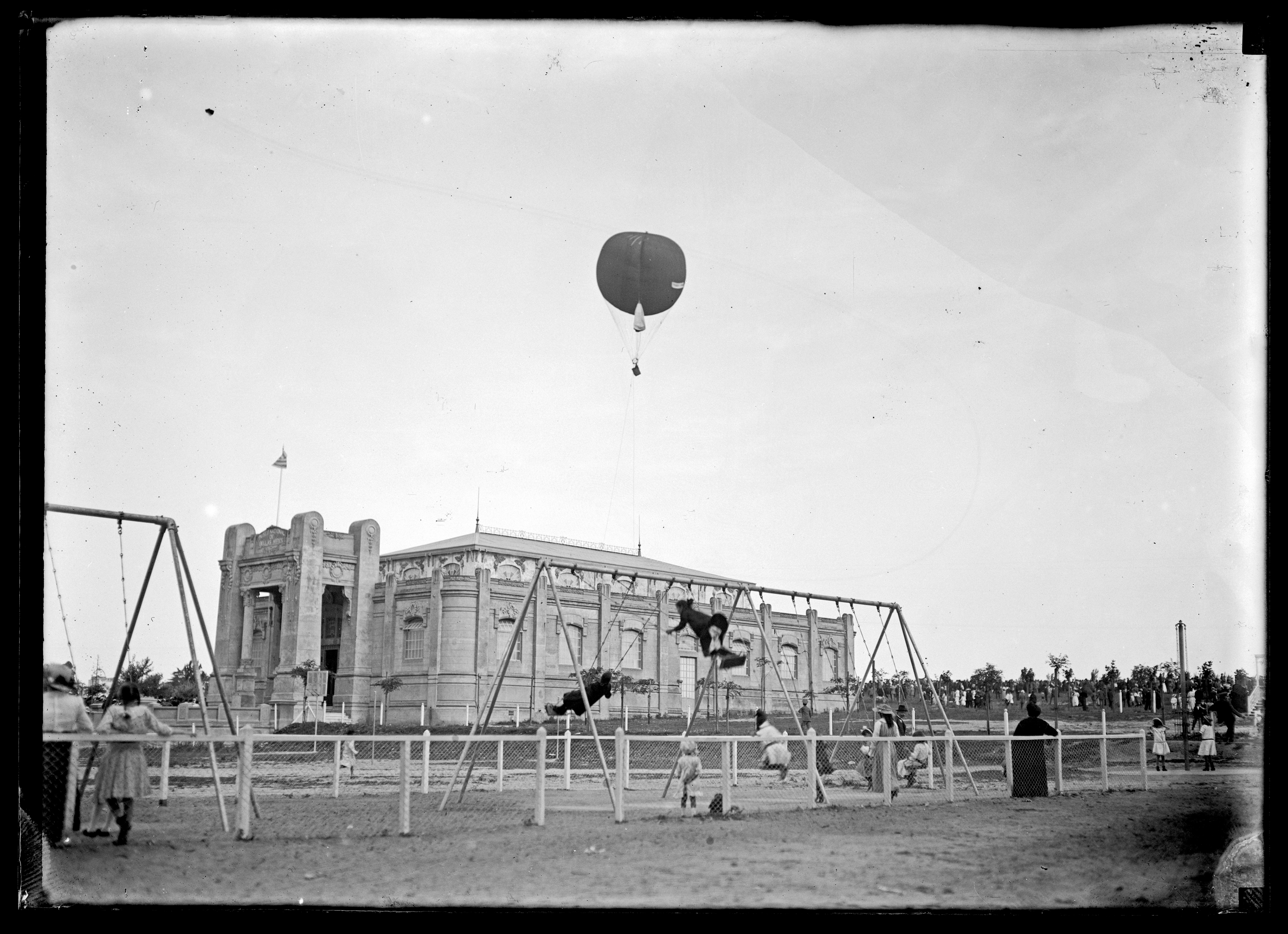 Plaza de Deportes nº 3. Al fondo: Museo de Bellas Artes. Barrio Parque Rodó (Montevideo, Uruguay).